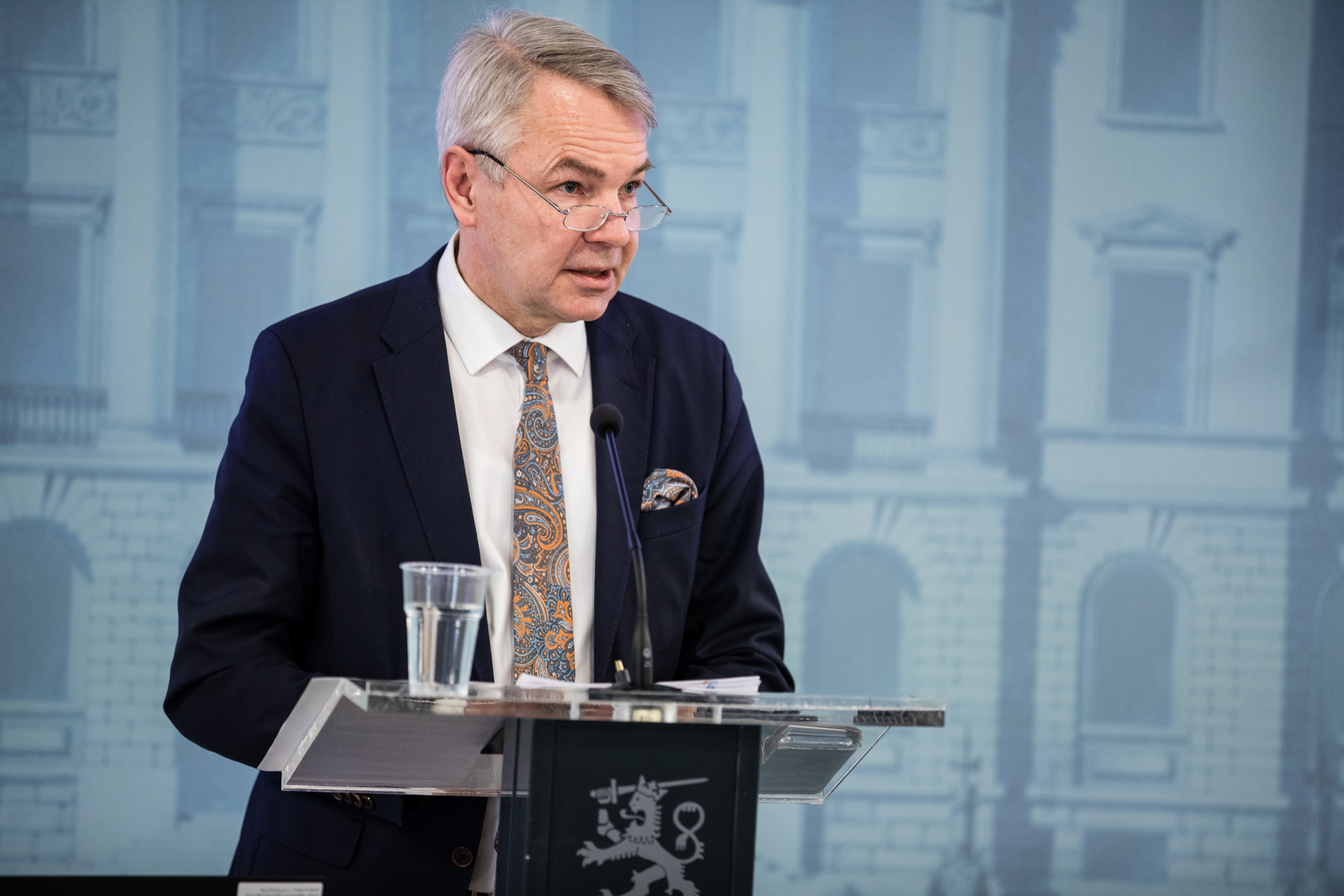 Ulkoministeri Pekka Haavisto kertoi suomalaisten matkailijoiden tilanteesta ulkomailla. © Laura Kotila | valtioneuvoston kanslia